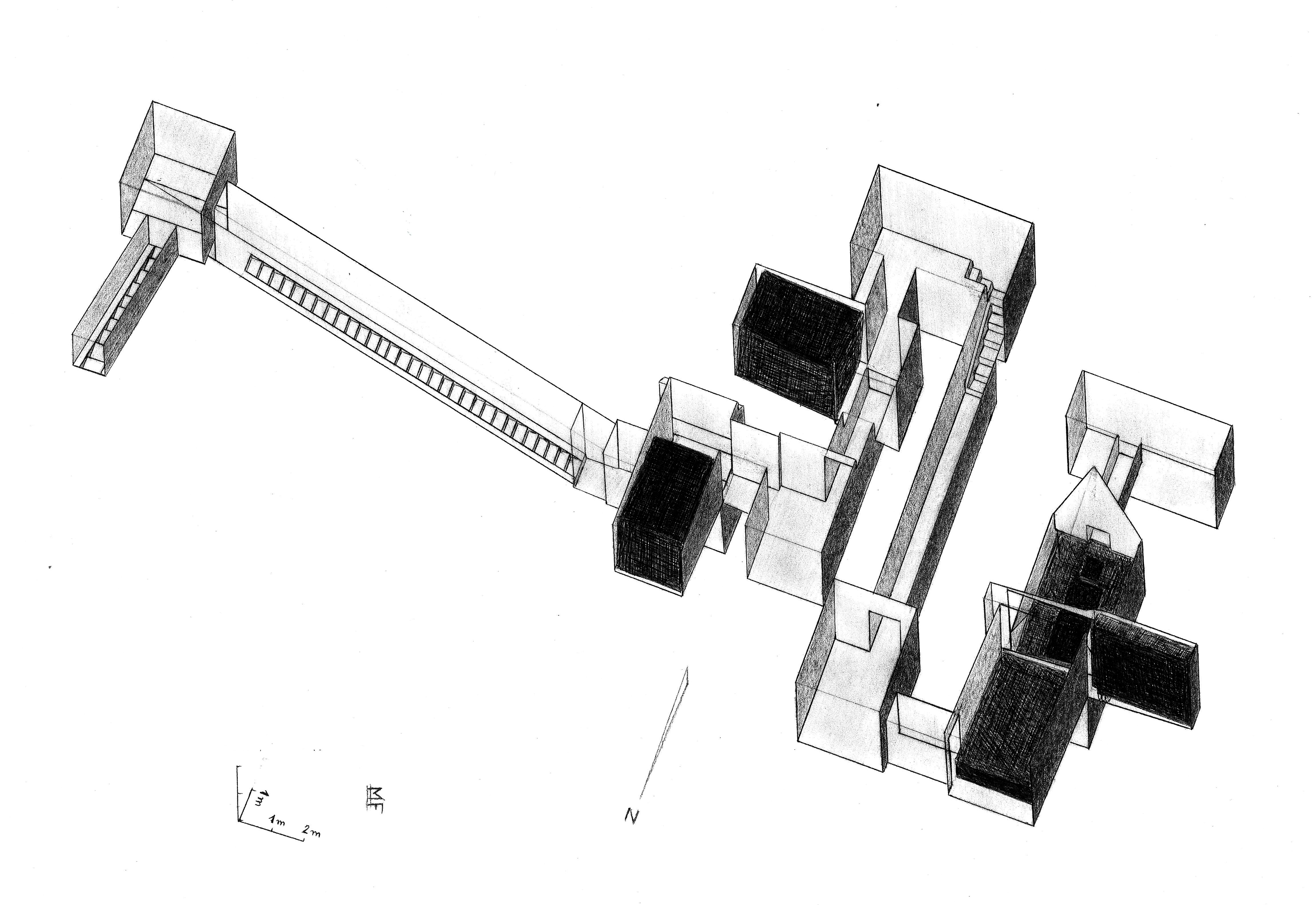 Vue des appartements funéraires de la pyramide nord de Mazghouna tels qu'ils ont été découvert ( herses et couvercle du sarcophage dans leur position d'attente )